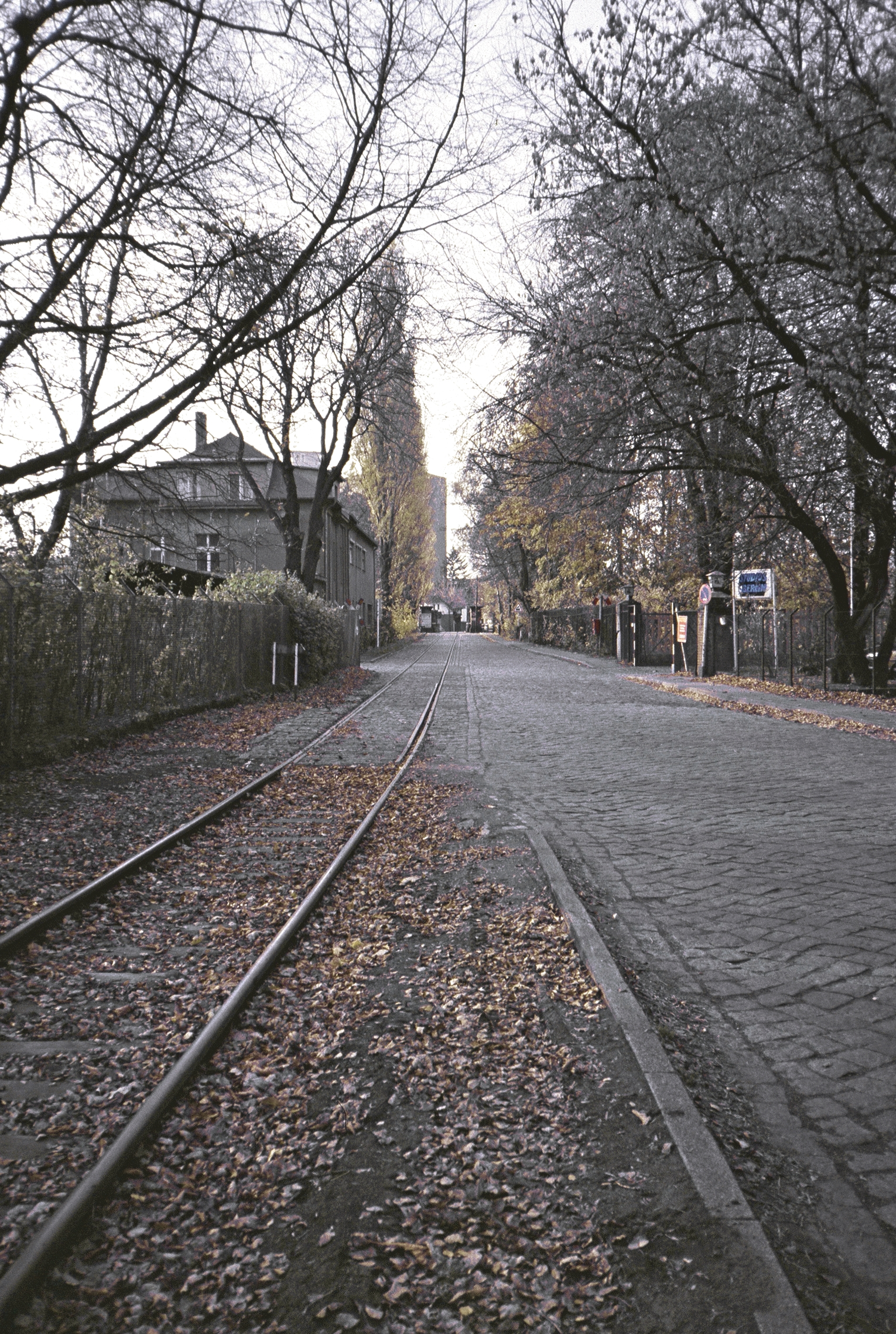 Eiswerderstraße Berlin-Haselhorst